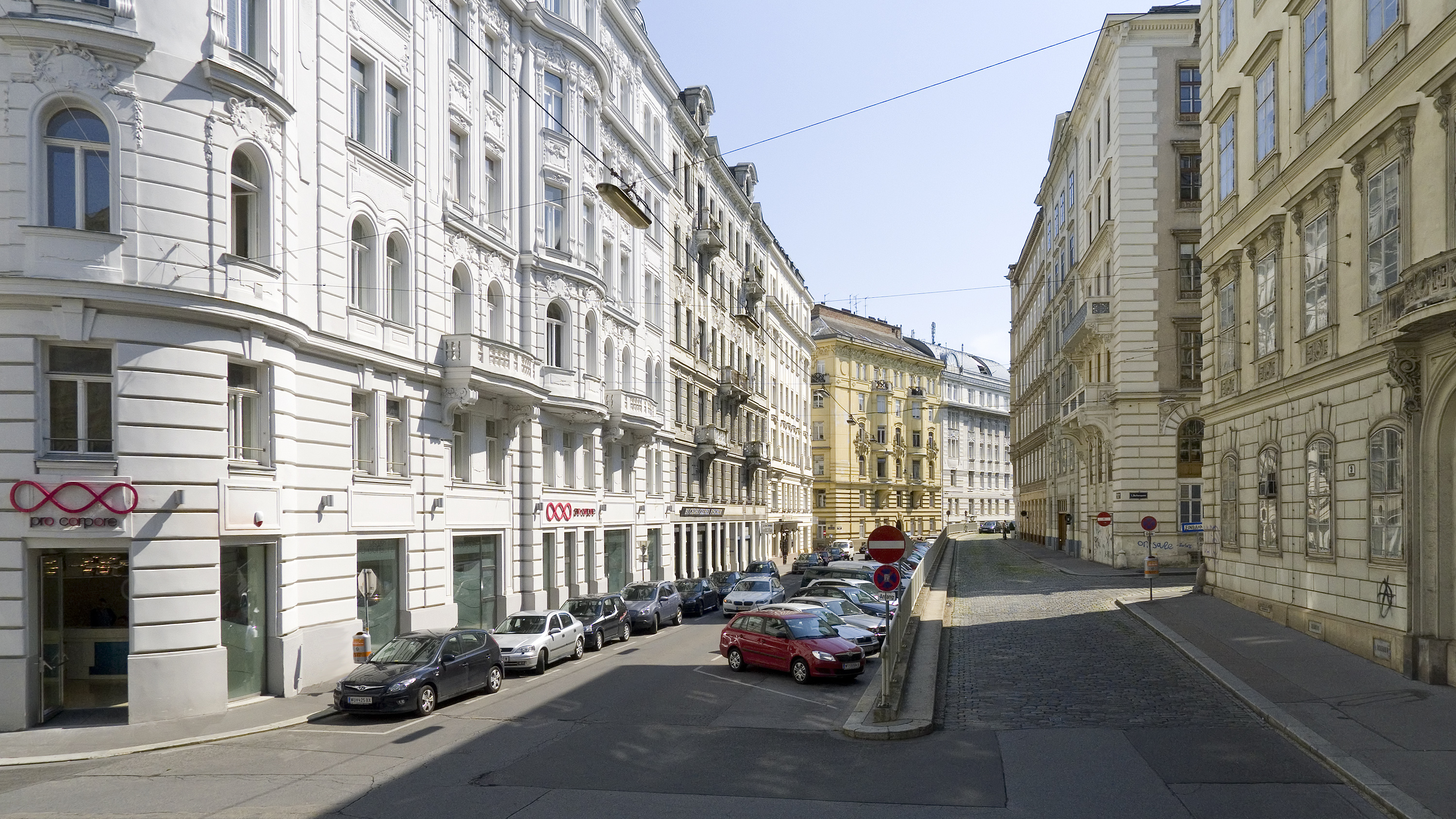 Dominikanerbastei in Wien 1 bei der Rosenbursenstraße Richtung Süden